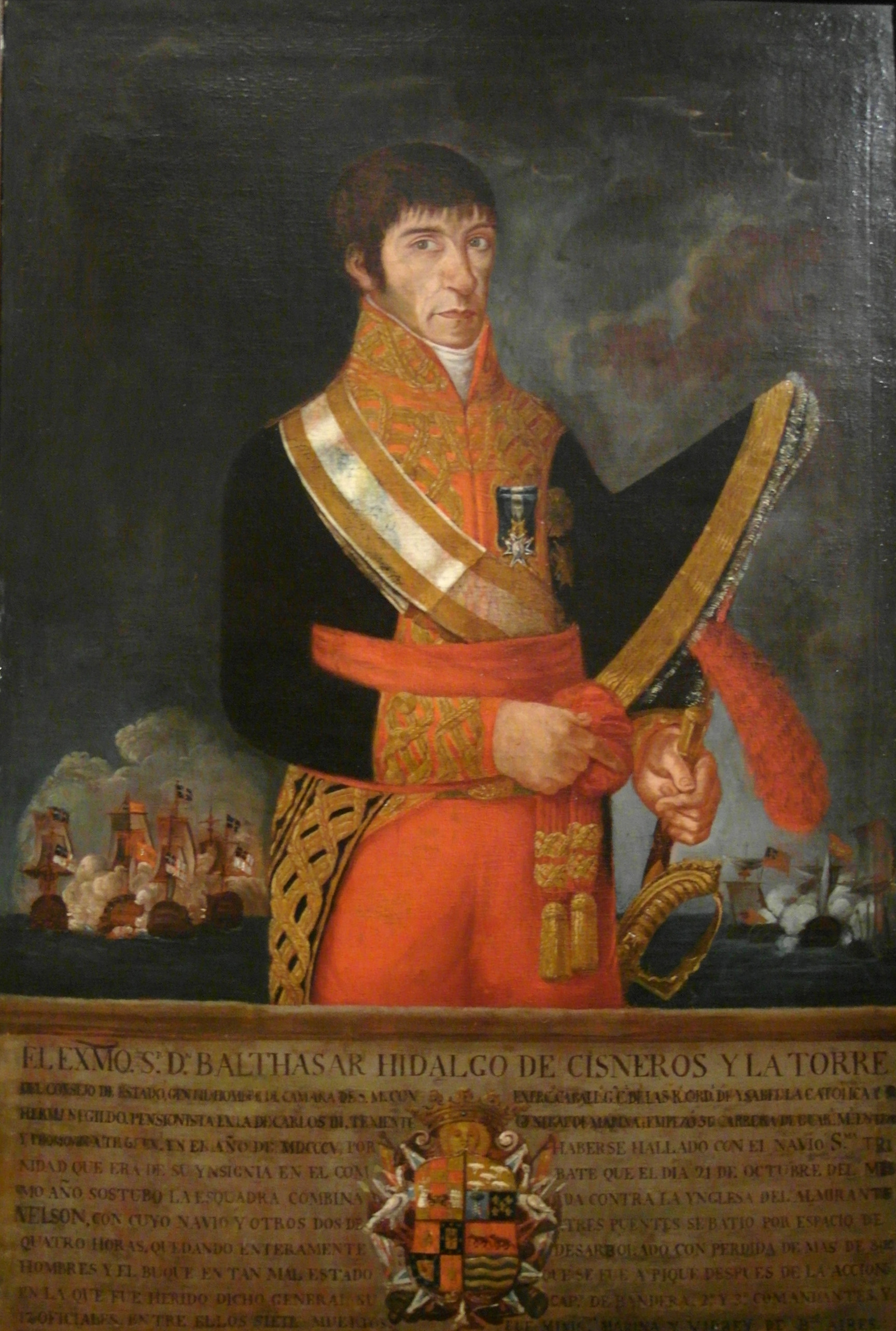 Retrato del teniente general Baltasar Hidalgo de Cisneros (1758-1829), que llegó a ser virrey del Río de la Plata.